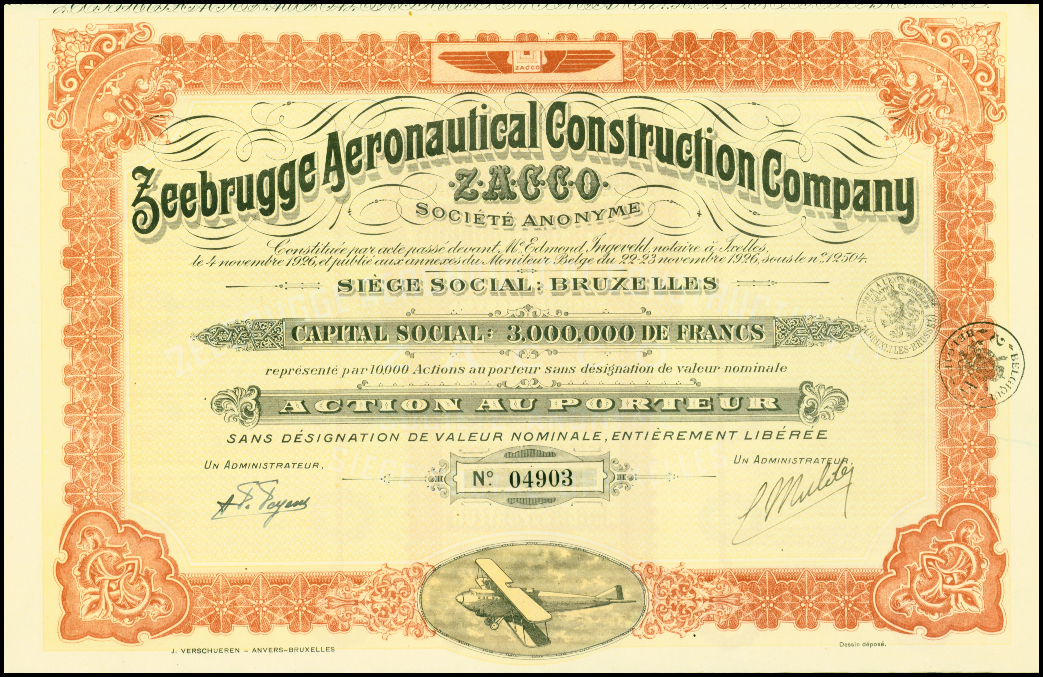 Aktie der Ateliers de Constructions Aeronautiques de Zeebrügge (ZACCO) vom November 1926; aus dem Fundus des Ersten Deutschen Historic-Actien-Museum e.V. (EDHAM), Kürnbach